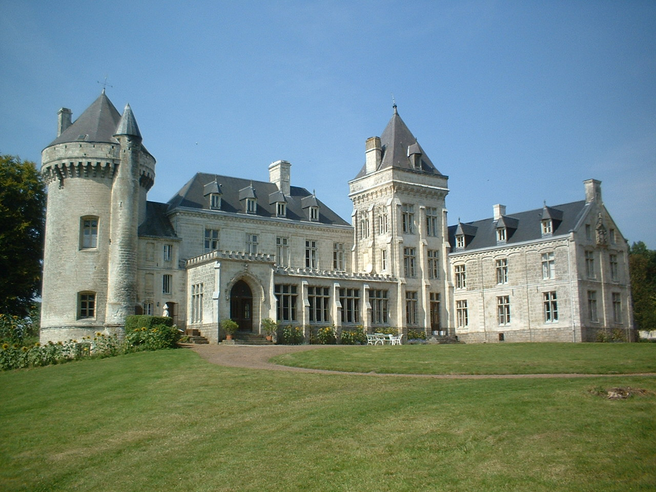 Château de villers-Châtel